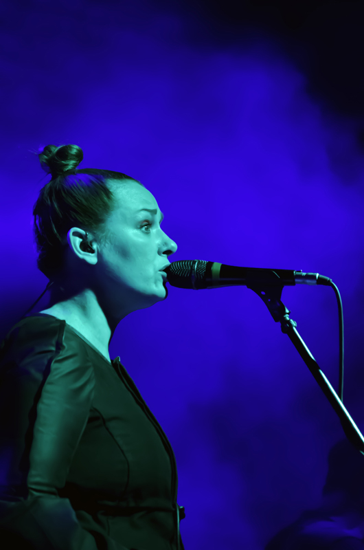 Hey podczas Rock May Festival 2012